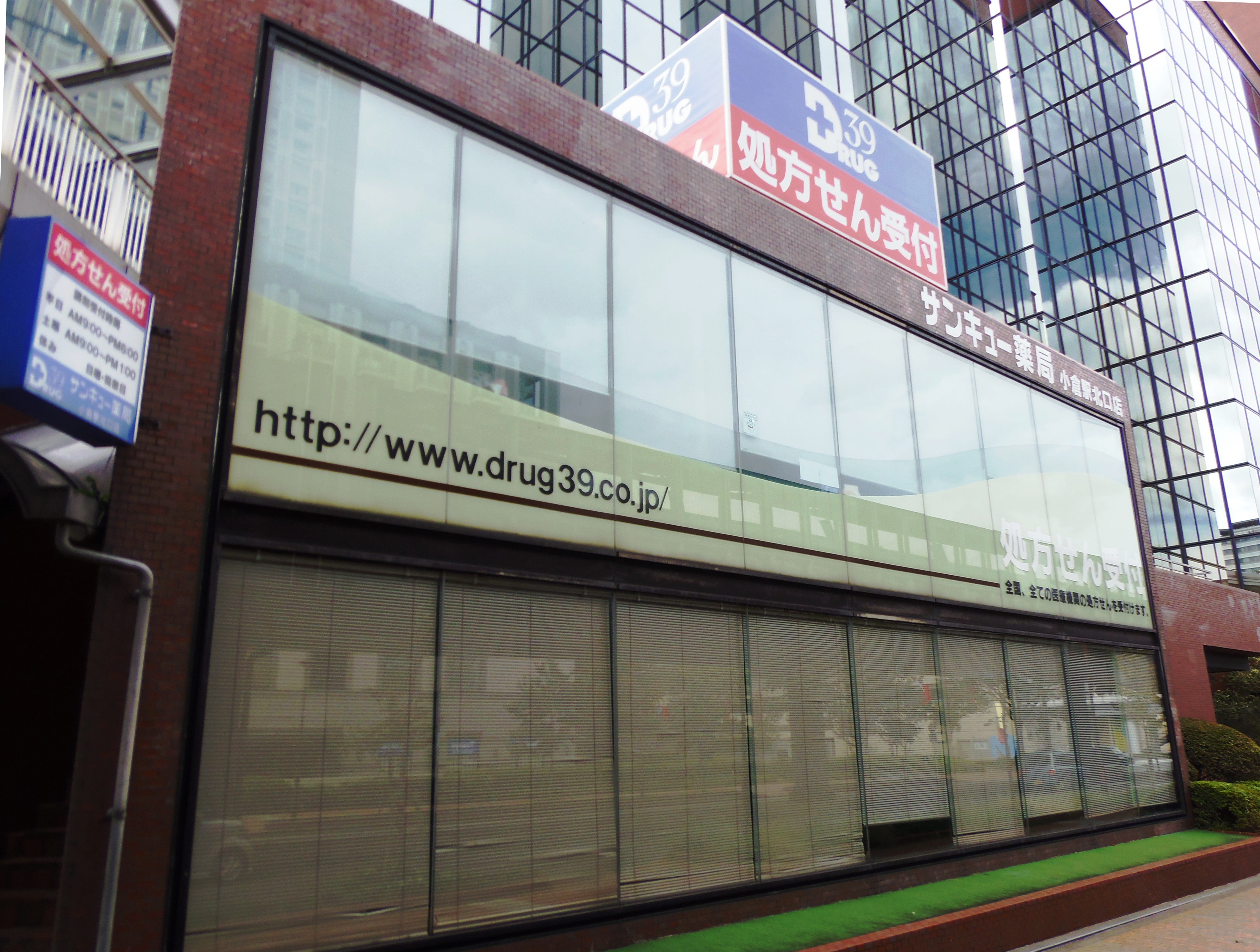 サンキュードラッグのサンキュー薬局小倉駅北口店